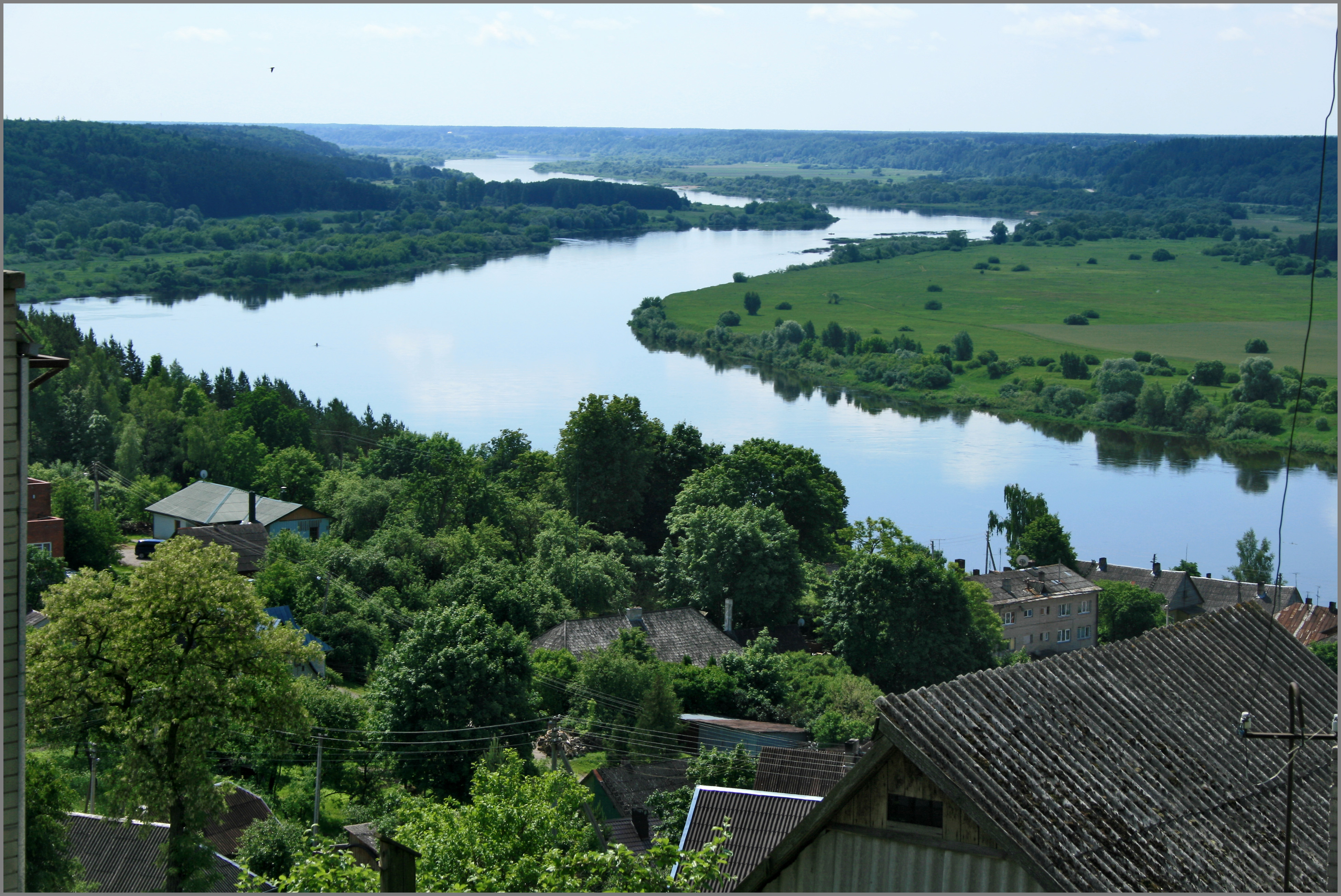 Neman / Nemunas / Nemūna / Неман